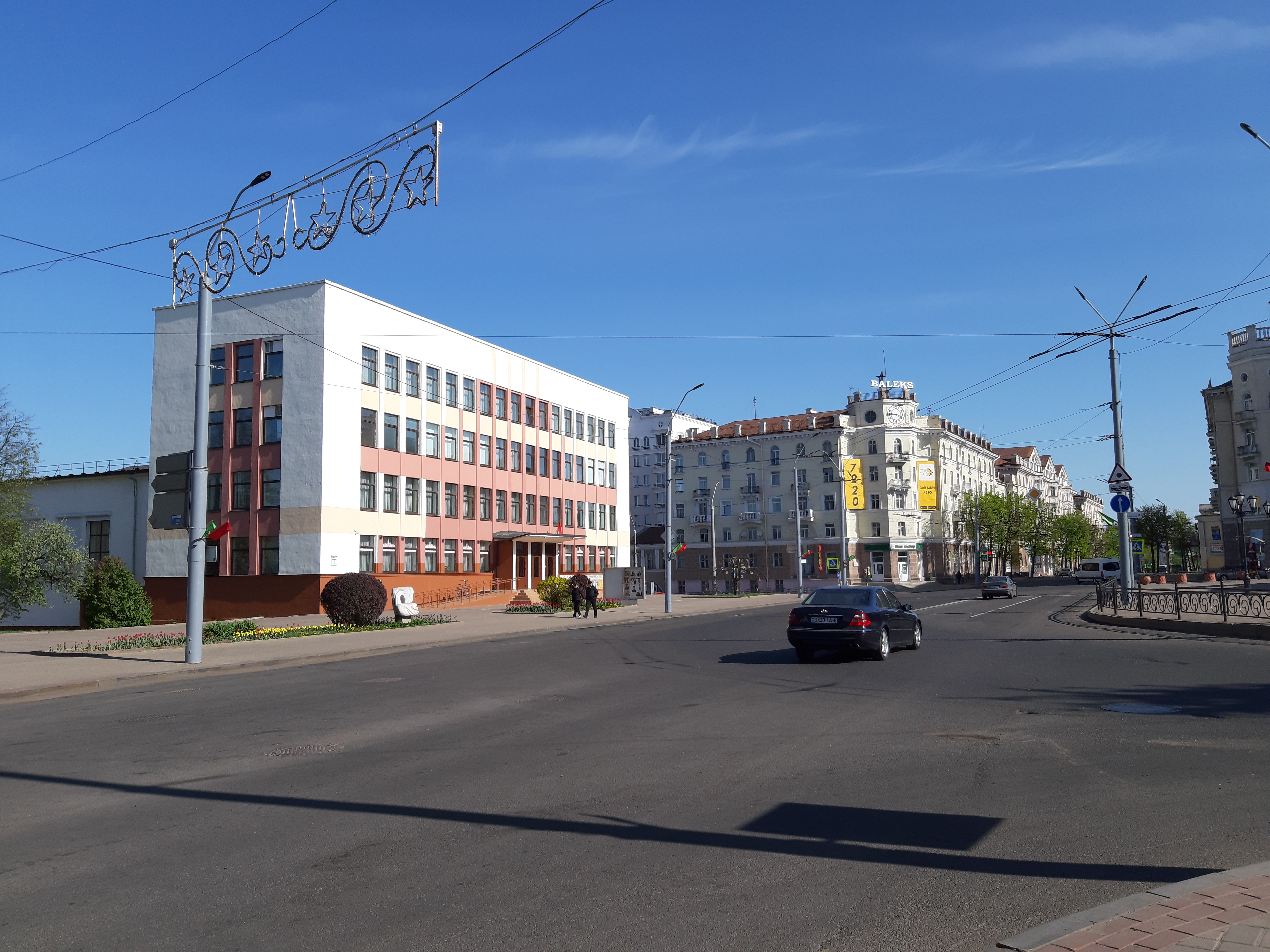 Магілёў. Стары горад